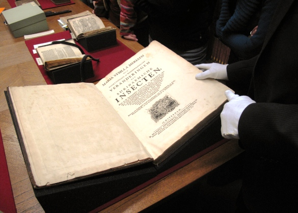 Deutsches Museum München - Libri rari: Maria Sibylla Merian